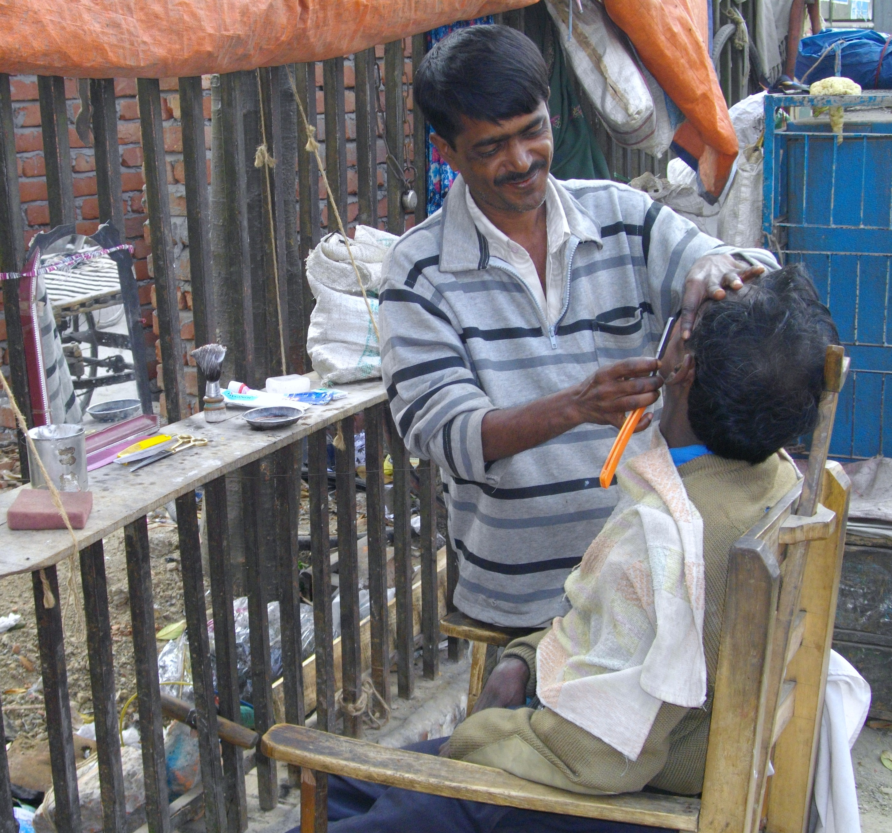 বাংলাদেশের নাপিত, পথের পাশে আয়না ঝুলিয়ে দাড়িঁ চাঁছছে।